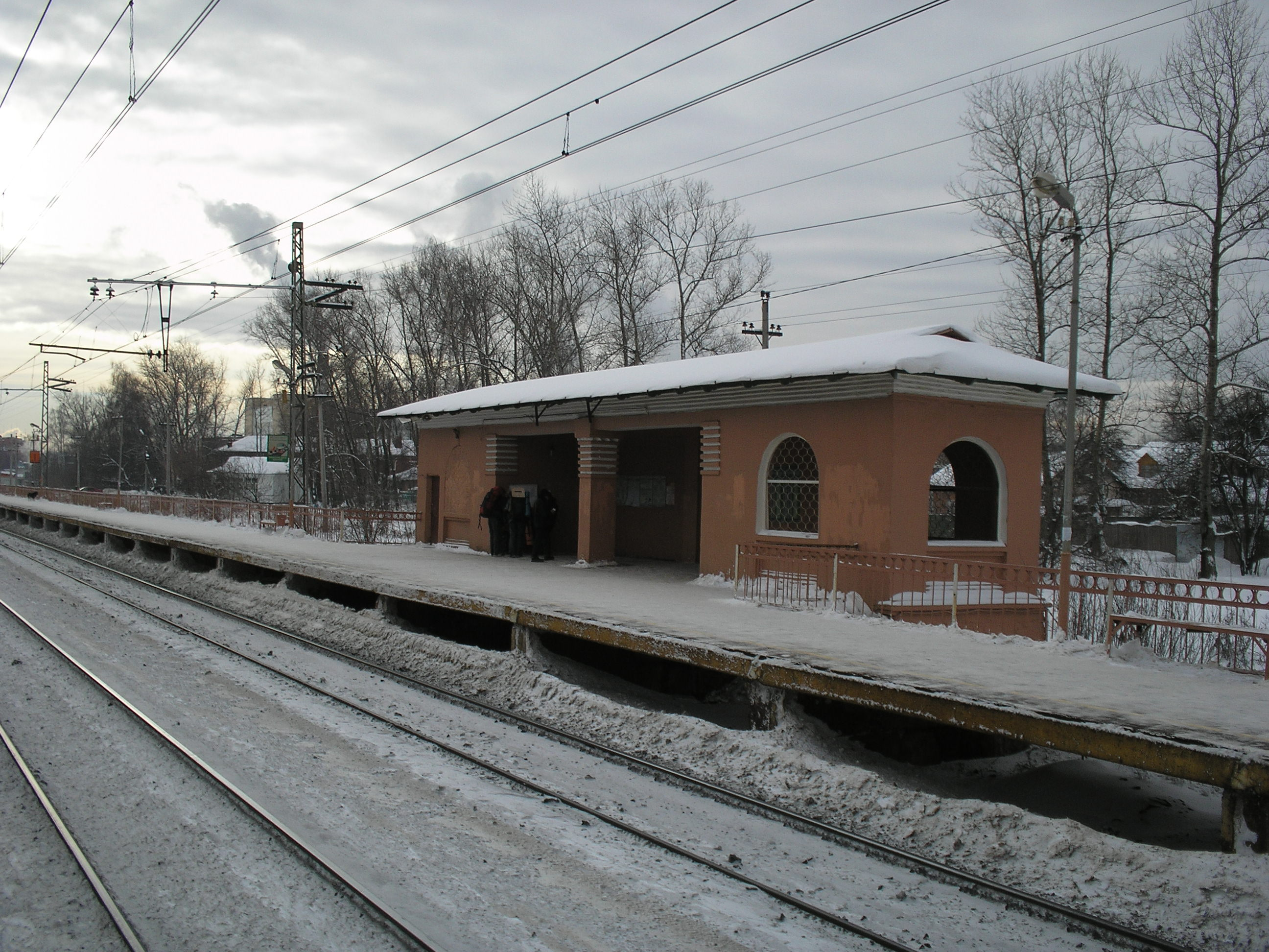 ж/д платформа Новодачная.